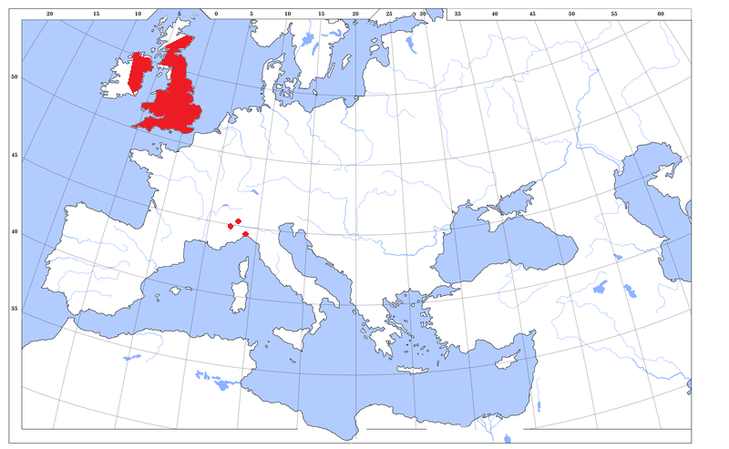 Sciurus carolinensis distribution in Europe (2006) based on data from (pdf about S. carolinensis by Piero Genovesi and Sandro Bertolino, update November 2006)